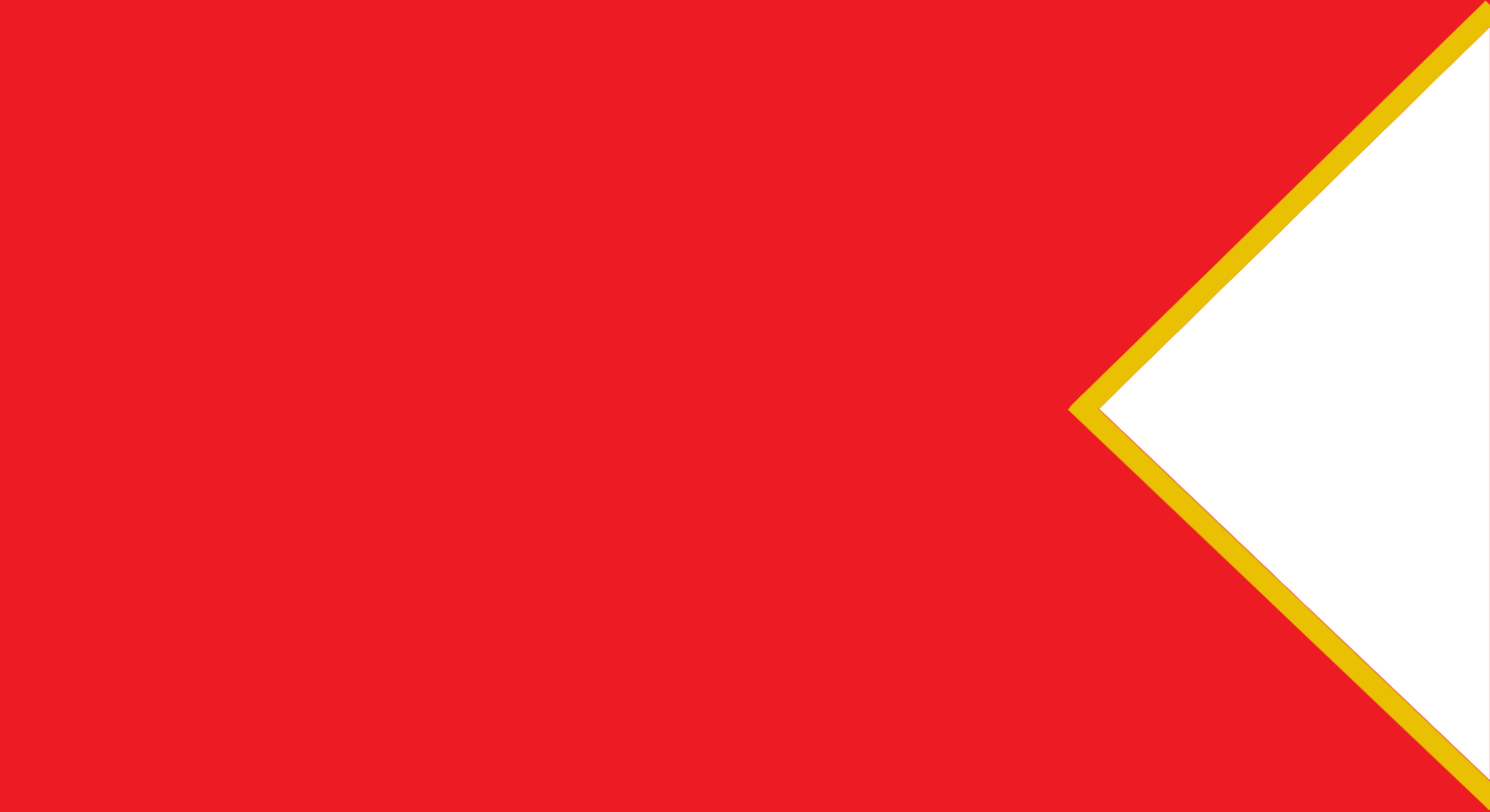 Pendón rojo con extremo abierto en V y boca ribeteada en oro